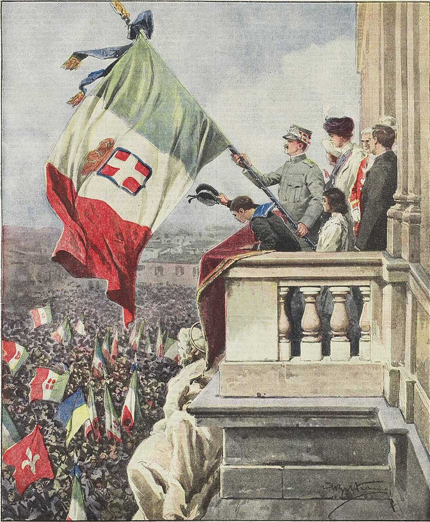 S.M. re Vittorio Emanuele III sventola il tricolore dal Quirinale al grido "Viva l' Italia!!!"